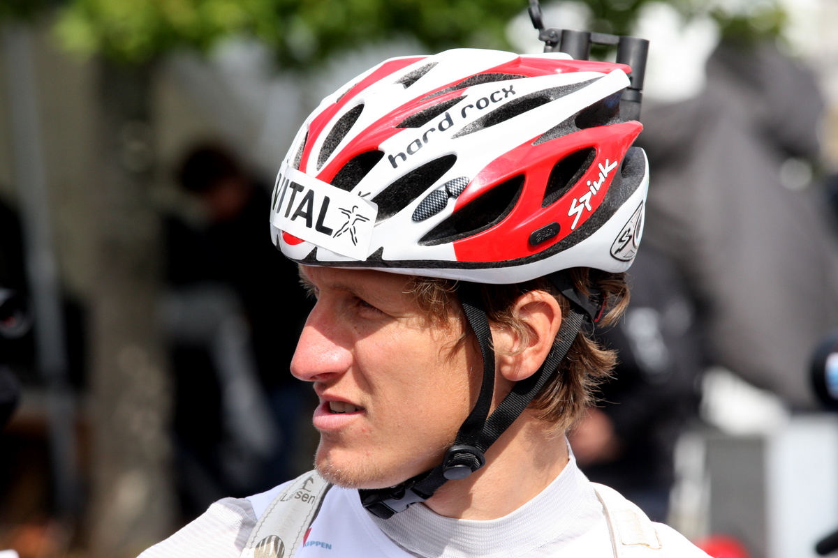 Lars Berger under Blinkfestivalen i Sandnes 2009